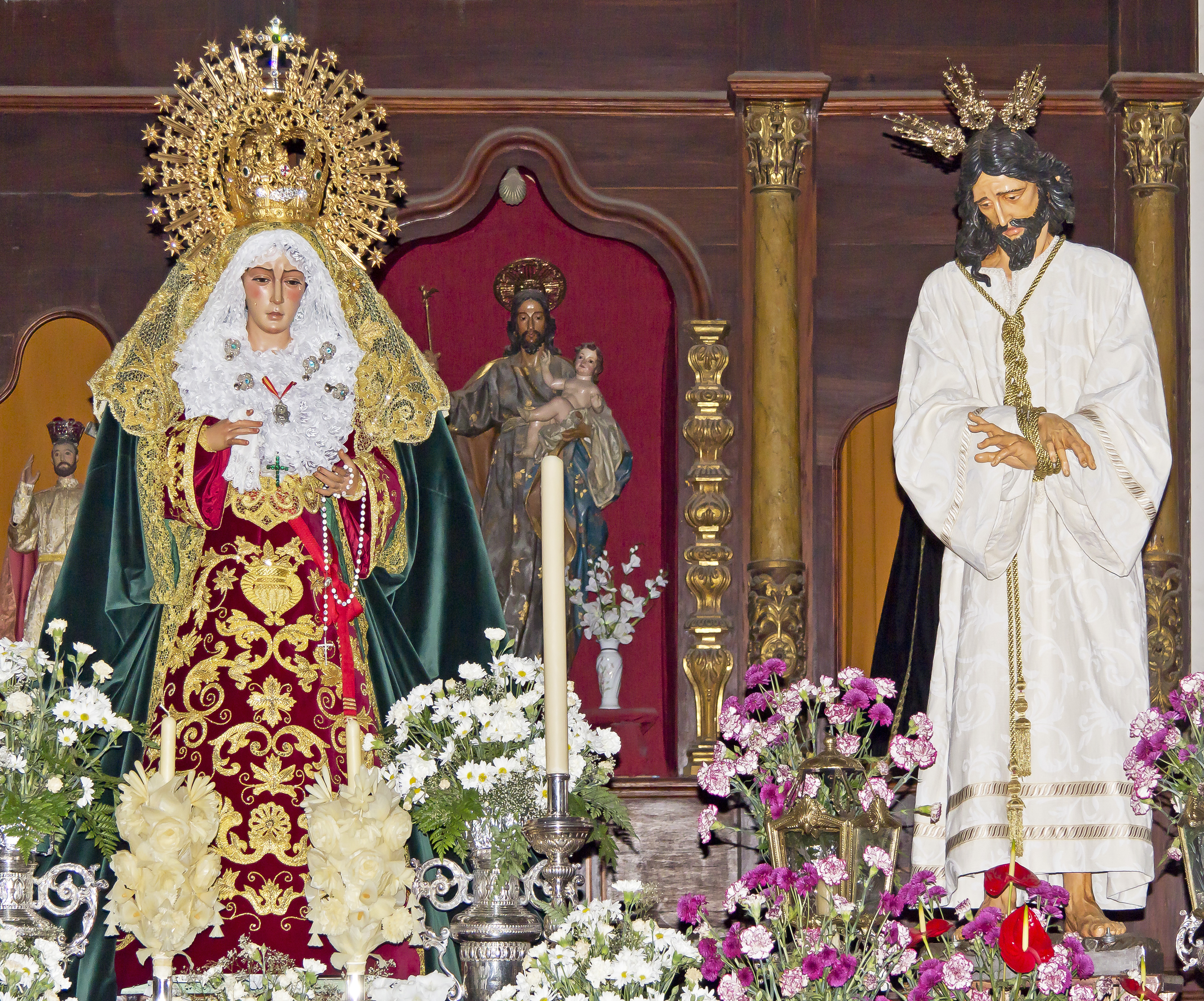 Christusfigur „Nuestro Padre Jesús Cautivo” und die Figur der Santa María de la Esperanza Macarena in der Kirche Nuestra Señora de la Concepción in Santa Cruz de Tenerife. Die Figuren befinden sich hier auf der Transporteinrichtung für die Prozession. Sie sind hier in der Bekleidung der Fastenzeit zu sehen.